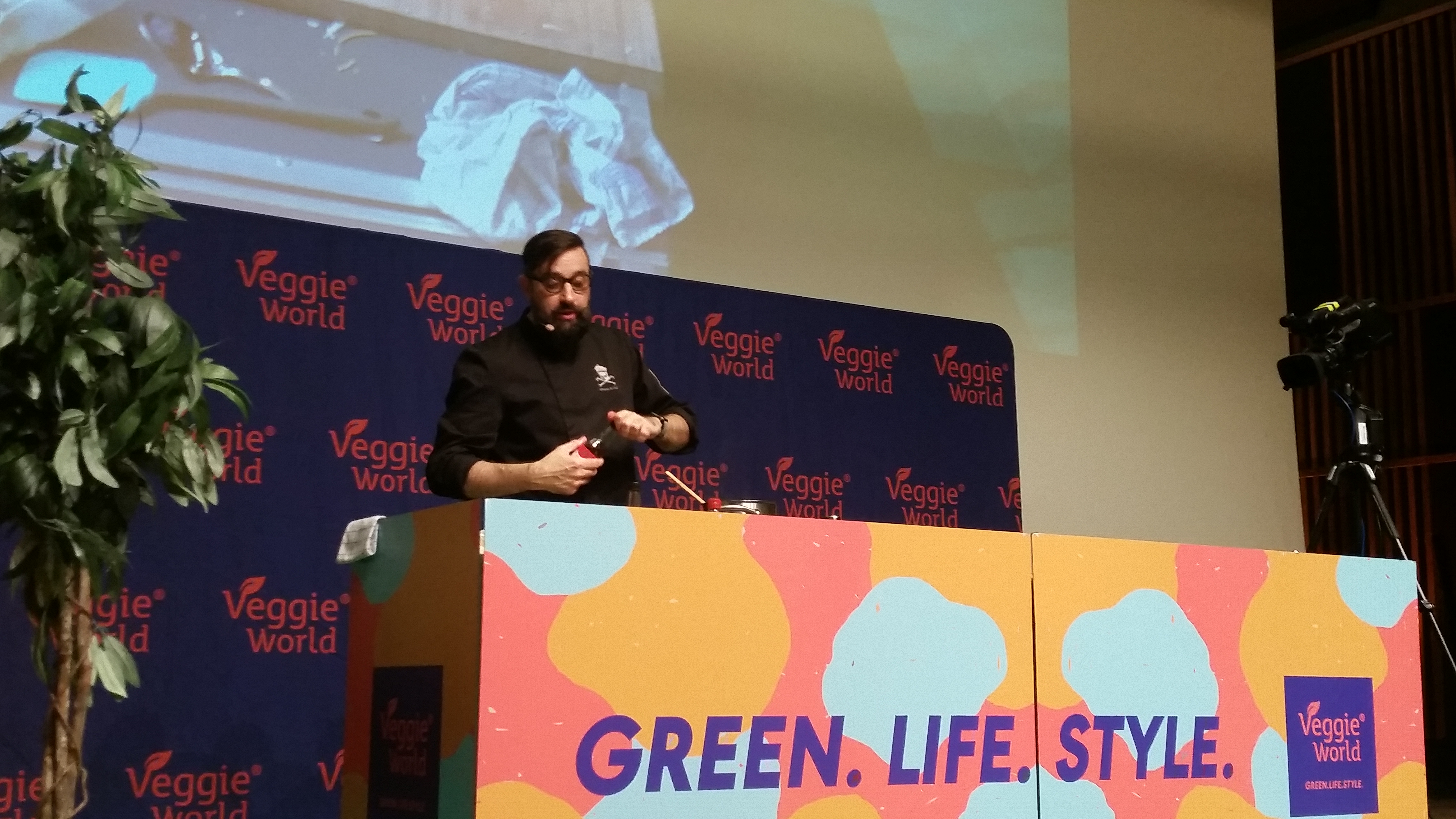 Démonstration culinaire de Sébastien Kardinal au VeggieWorld Paris en octobre 2019